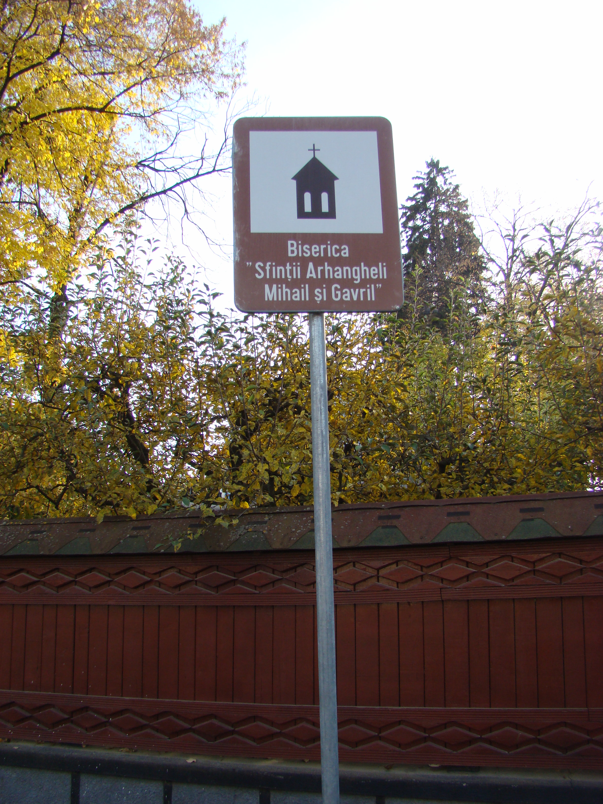 Biserica „Sfinții Arhangheli Mihail și Gavril", sat aparținător Satu Nou de Sus; oraș Baia Sprie